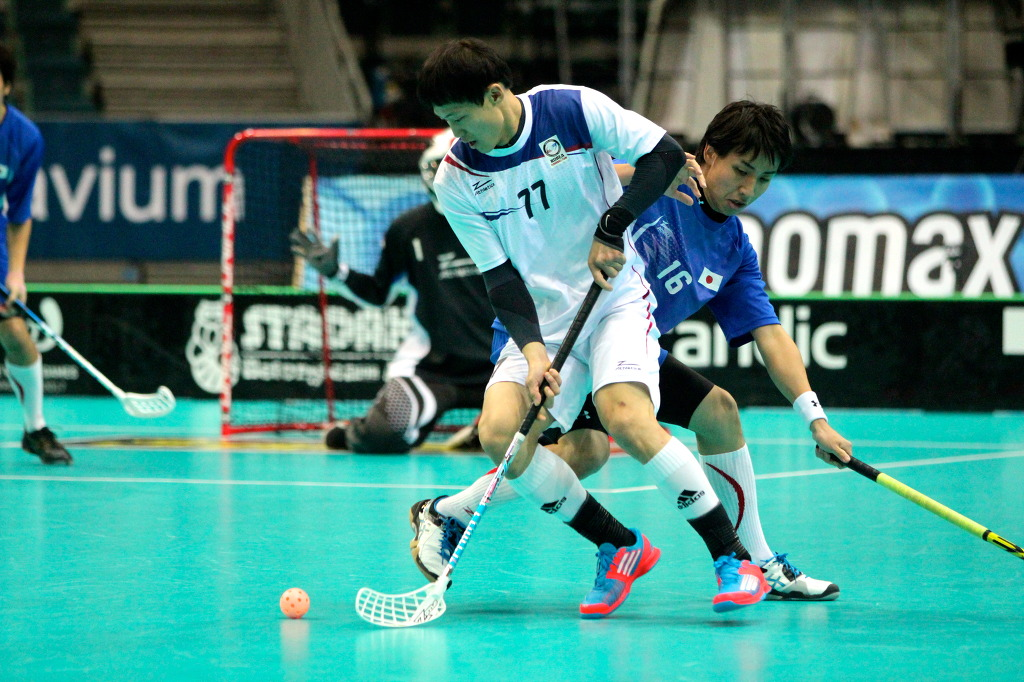 우레탄 재질 경기장 플로어볼 남국선수